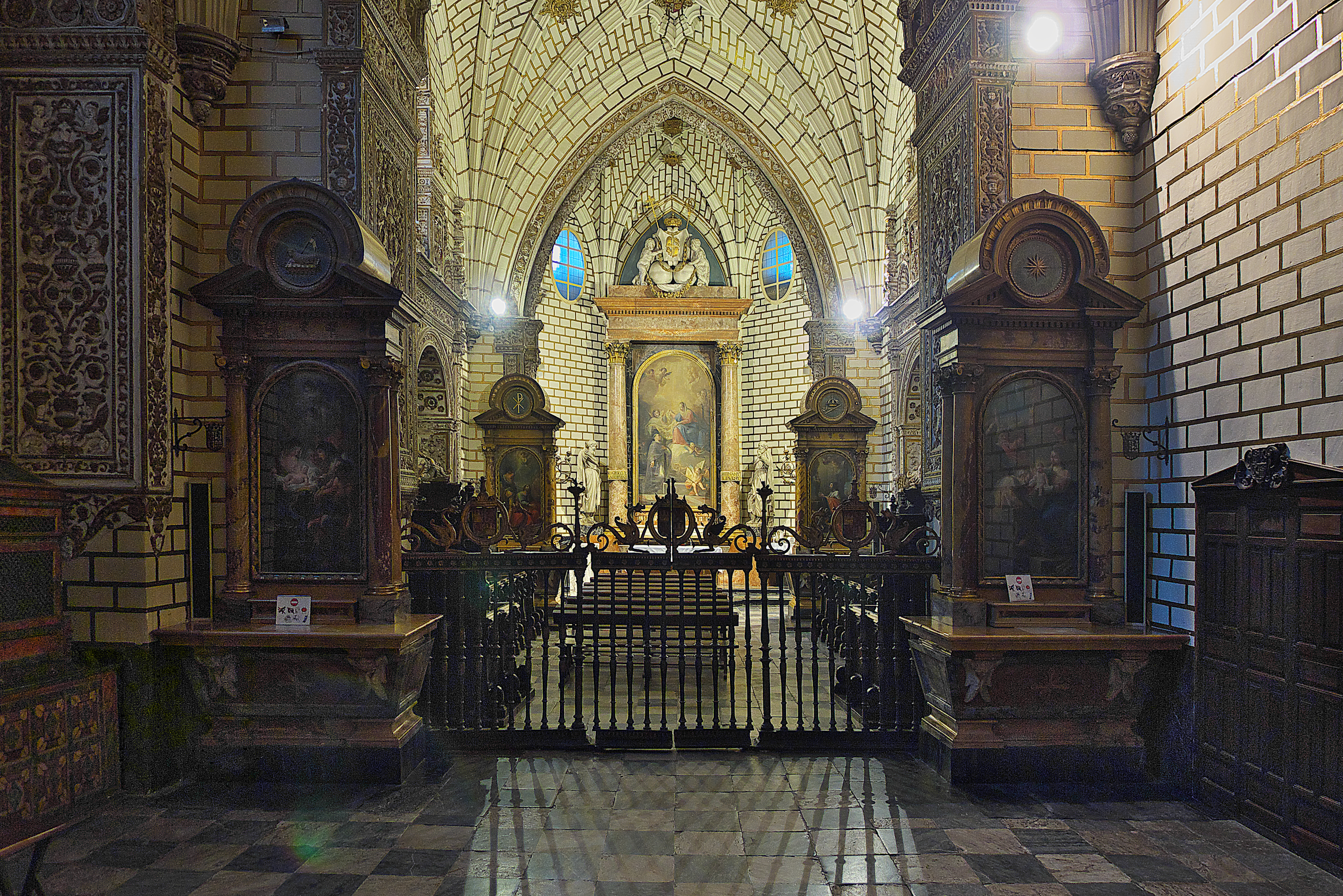 Alfonso de Fonseca y Acevedo, arzobispo de la Catedral de Toledo, consigue de Carlos I, de cuyo Consejo Real era miembro, la autorización del traslado de la Capilla Real, fundada por Enrique II de Castilla (+1379) situada a los pies de la catedral. Hecho similar a lo sucedido con la otra Capilla Real, la llamada Capilla de los Reyes Viejos. Alonso de Covarrubias, Maestro Mayor de la catedral, proyecta la nueva, situada en la girola (1531-1534).